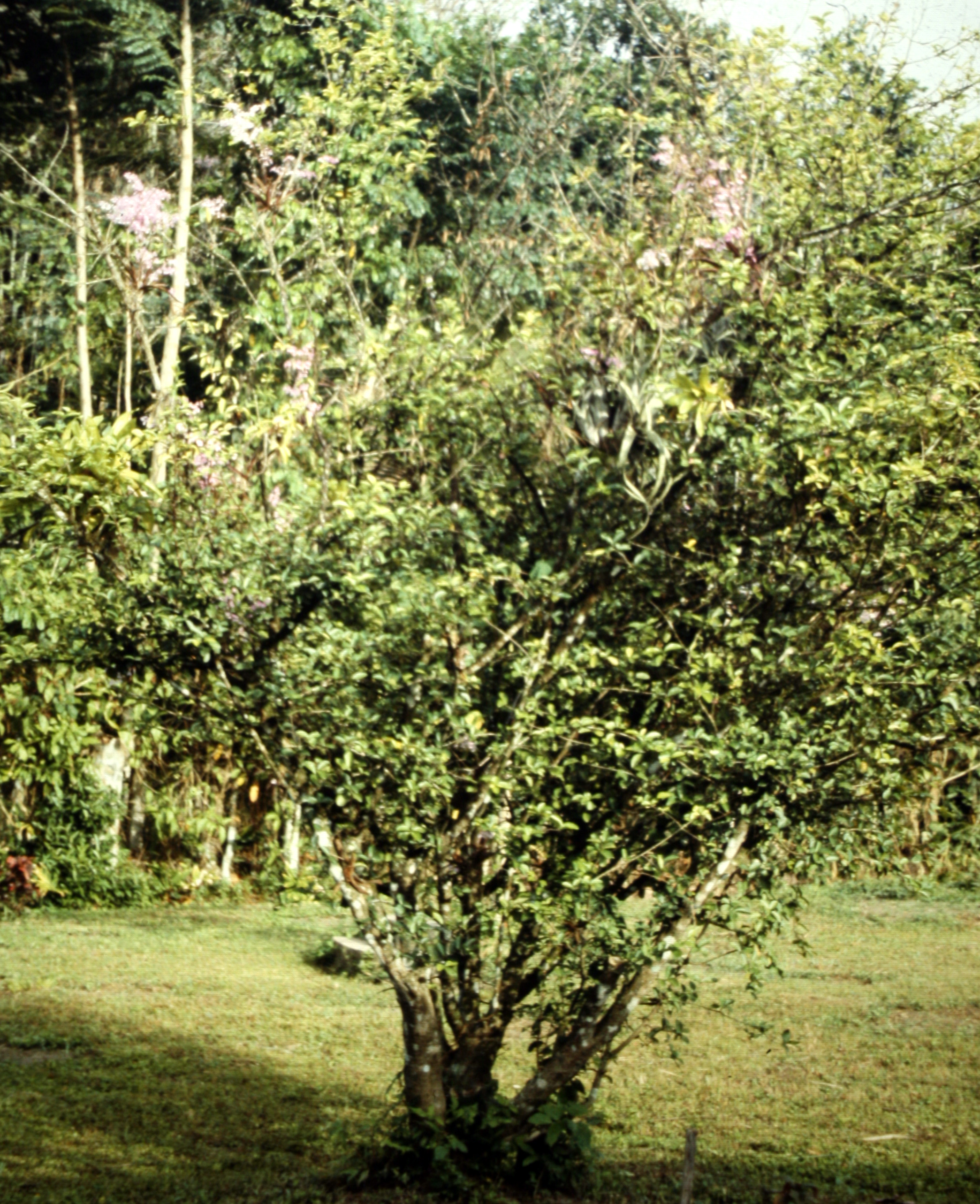 Ionopsis utricularioides, Suriname. In Lelydorp garden